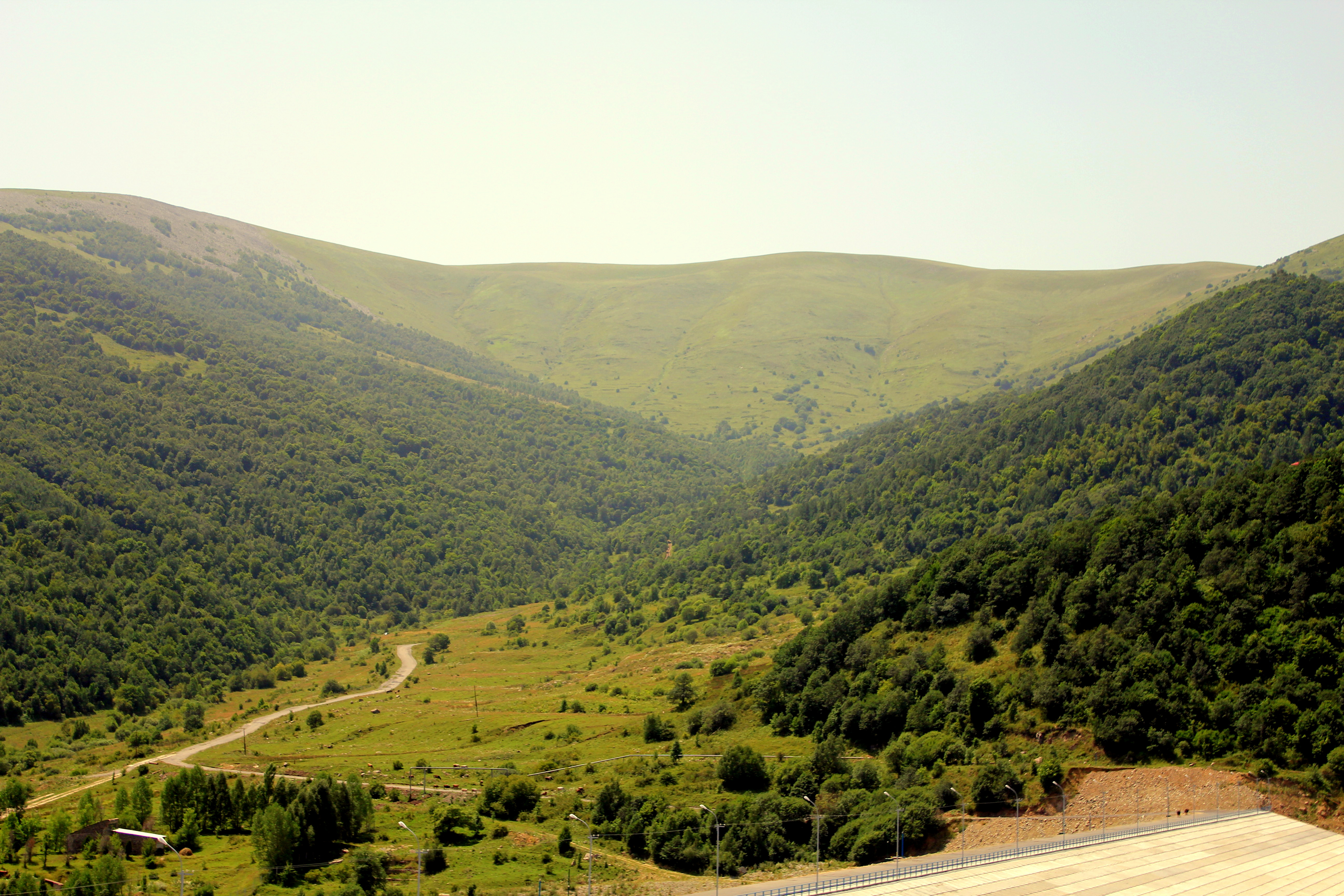 Близ села Анкаван